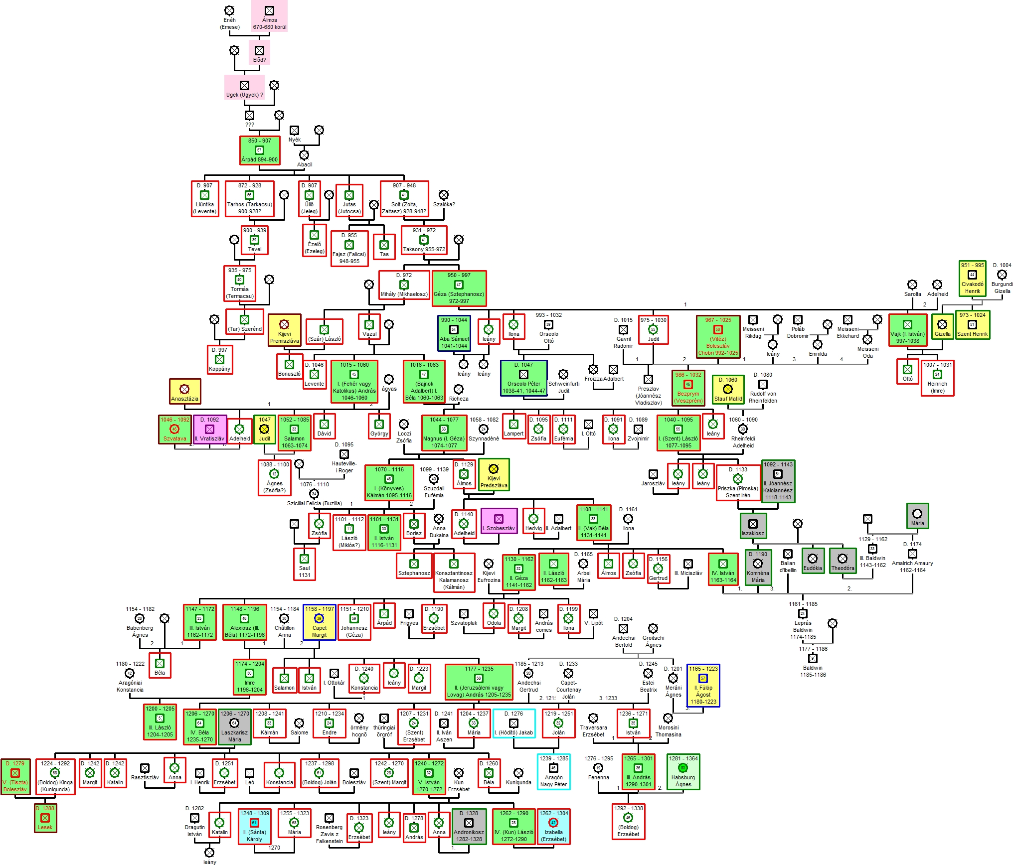 Az Árpád-ház családfája